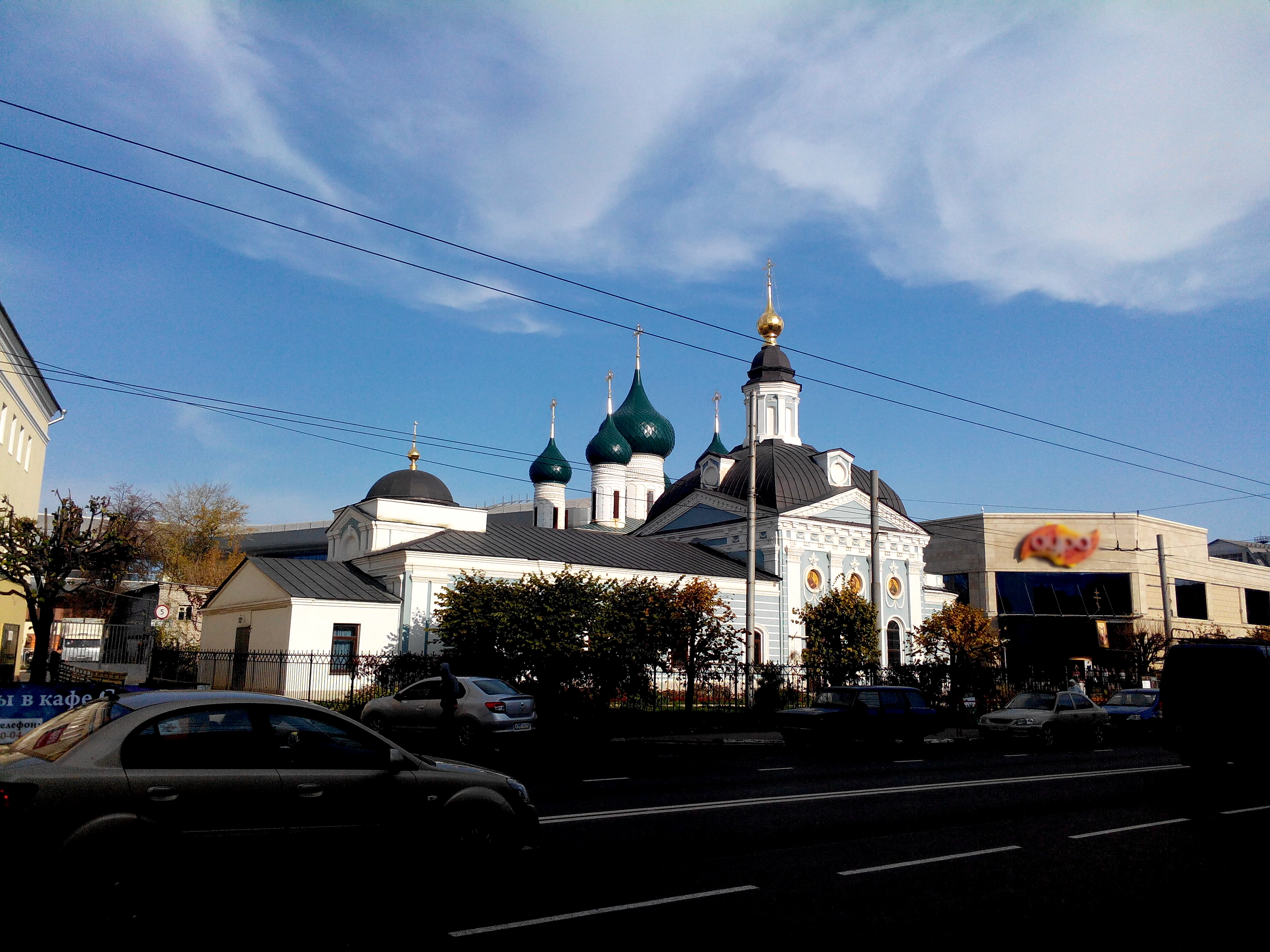 Храмовый комплекс (Ярославская область, Ярославль, Свободы улица, 44, 44-а)